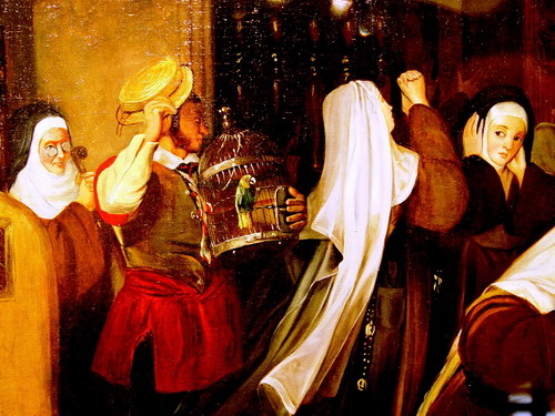 Vert-Vert (détail), tableau de Jean-Claude Barat dit Commandant Barat d'après le Vert-Vert de 1847 de Claudius Jacquand et d'après Vert-Vert, poème de Jean-Baptiste Gresset. Plusieurs autres tableaux s'inspirent du même thème : Vert-Vert de Fleury François Richard, Vert-Vert d'Auguste Couder, Vert-Vert de François Marius Granet et le Vert-Vert de 1835 de Claudius Jacquand.